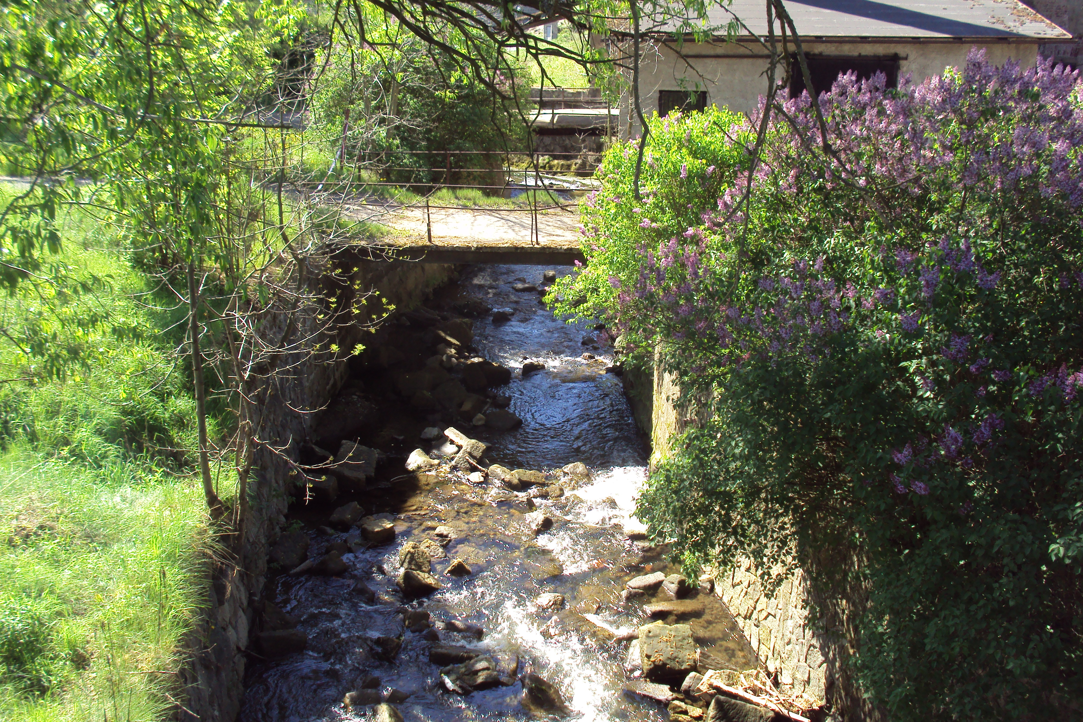 Boberský potok teče skrz město Cvikov